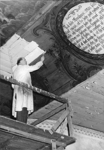 Takmålningar på trä, under framtagningen. Kategori: (03) Målningar på träTakmålningar på trä, under framtagningen.